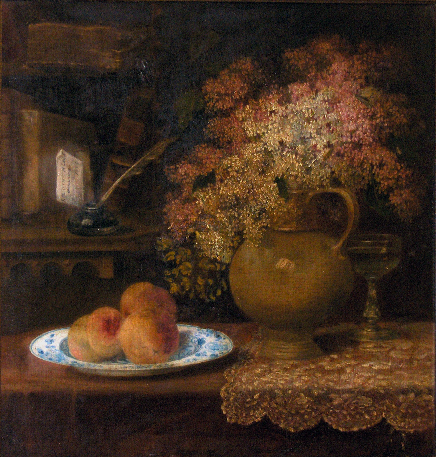 "Stilleven met bloemen en fruit"(1885), olieverf op doek door Joseph Martin Ryssens De Lauw (1830-1889)